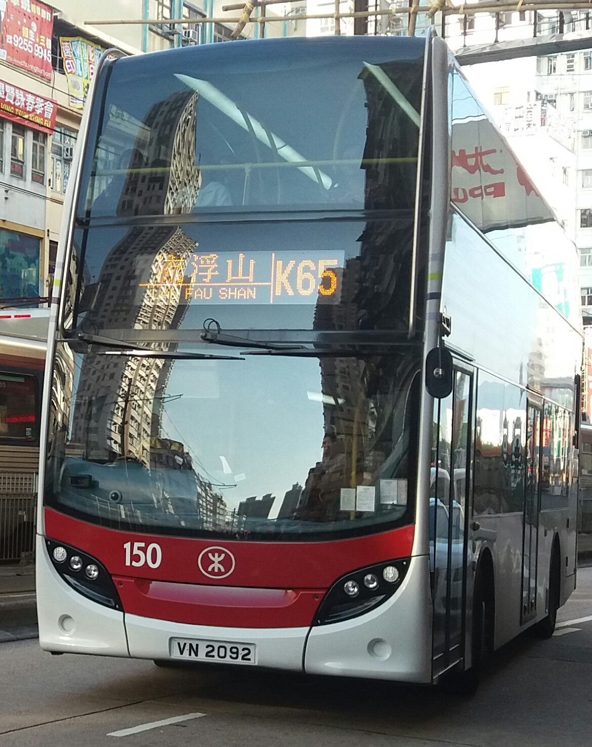 中文（香港）: 港鐵巴士K65線